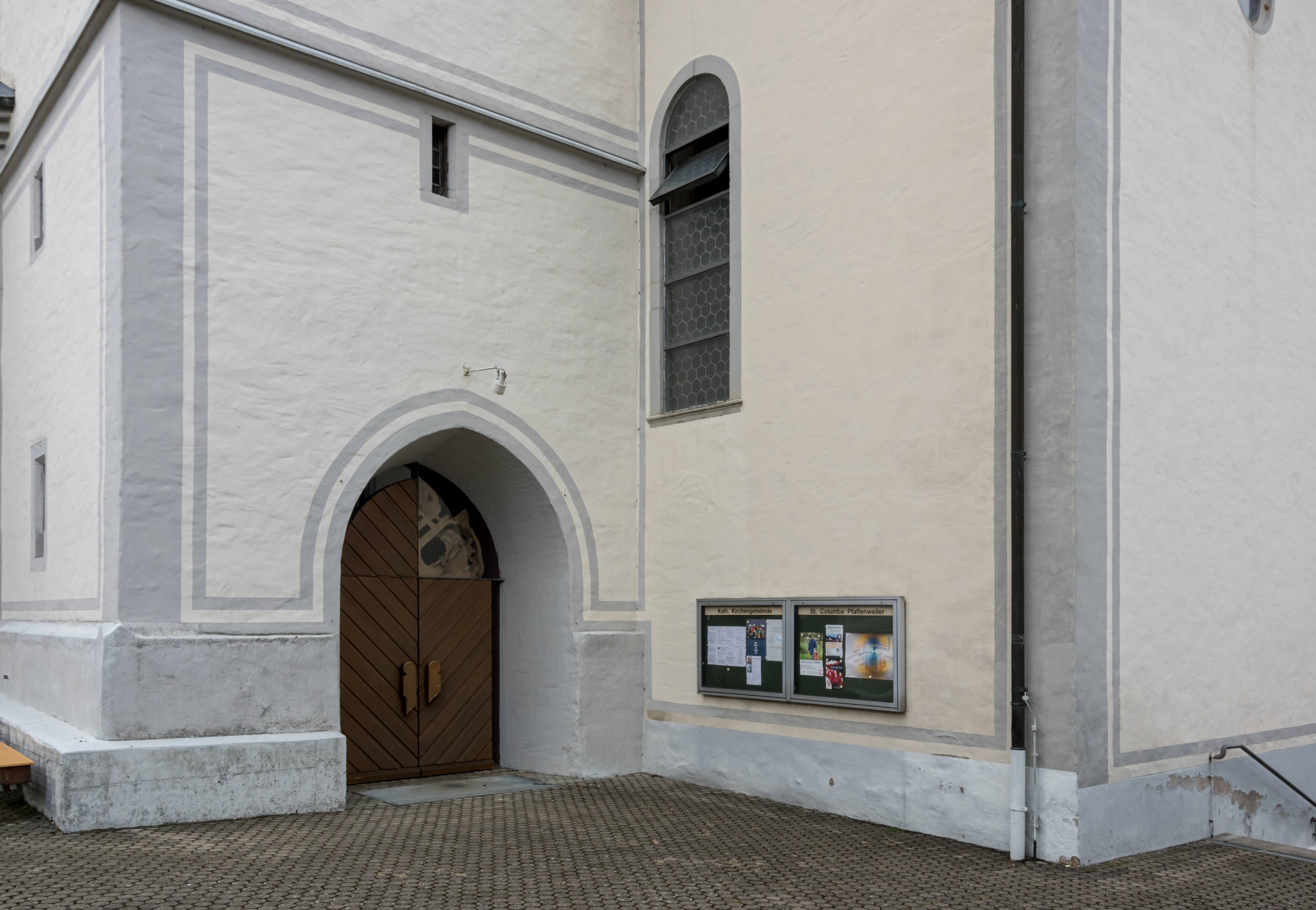 Bilder von St. Columba. in Pfaffenweiler